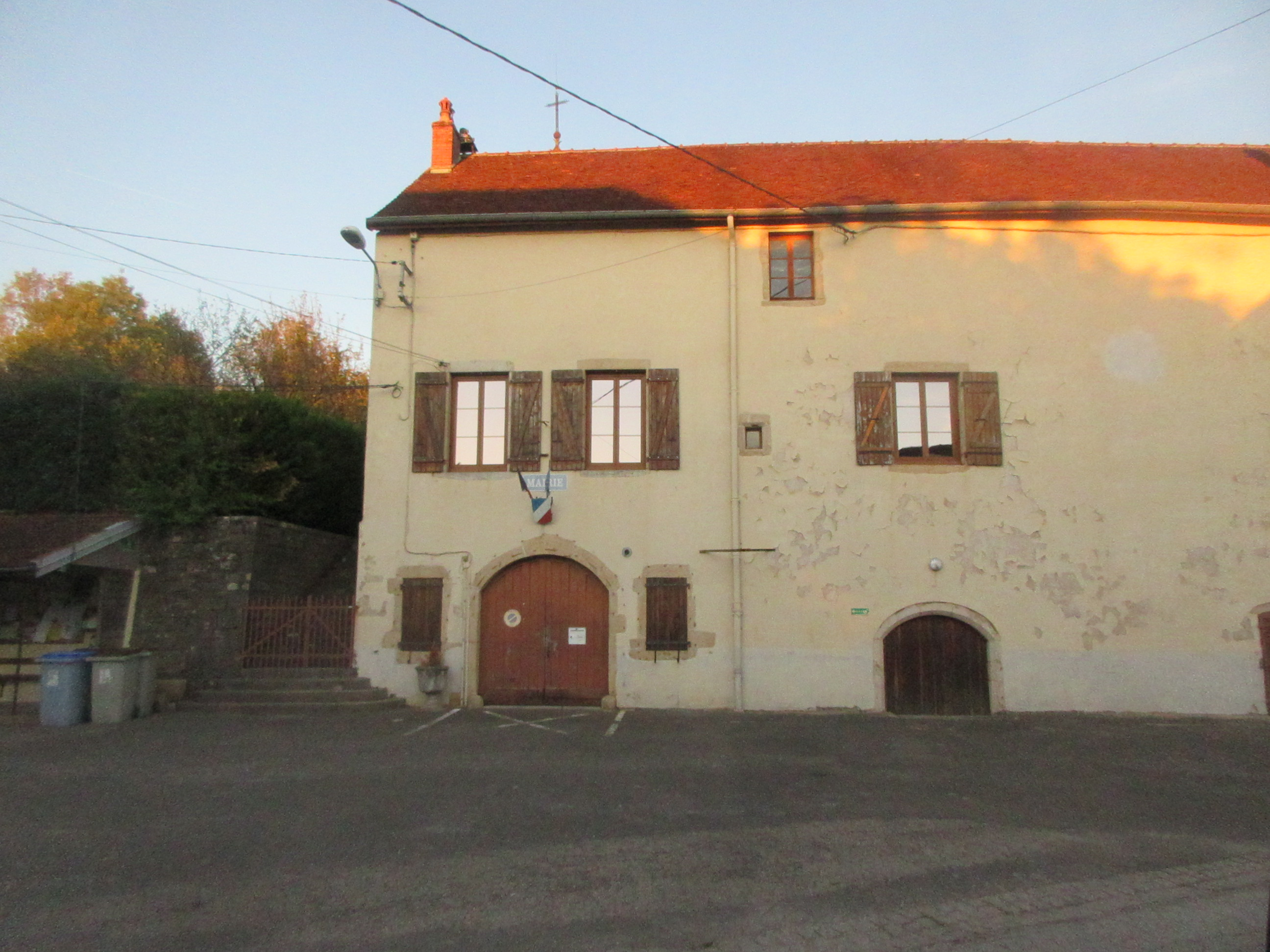 Mairie de Cesancey.